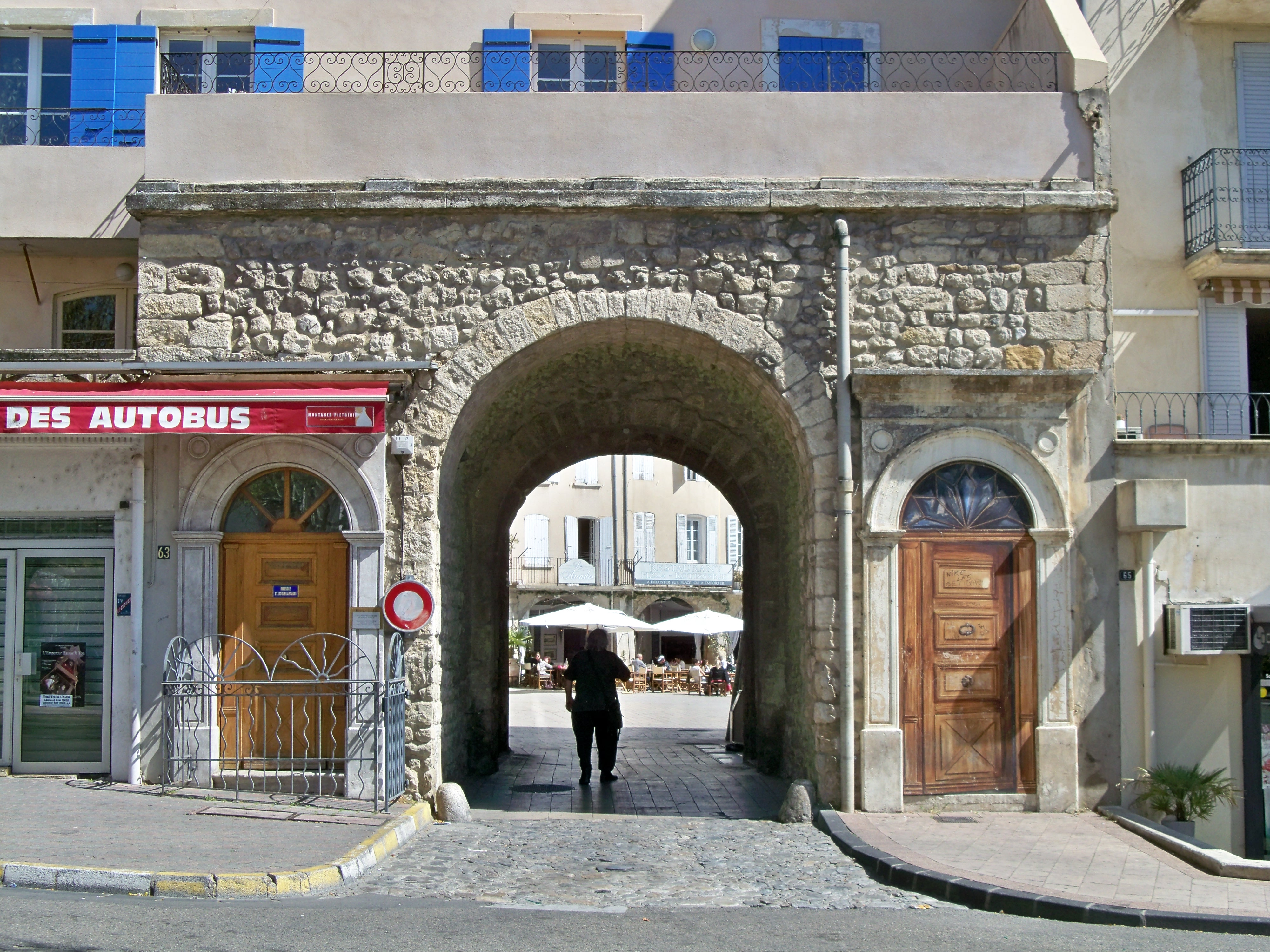 Porte Saint Jacques à Nyons (26)